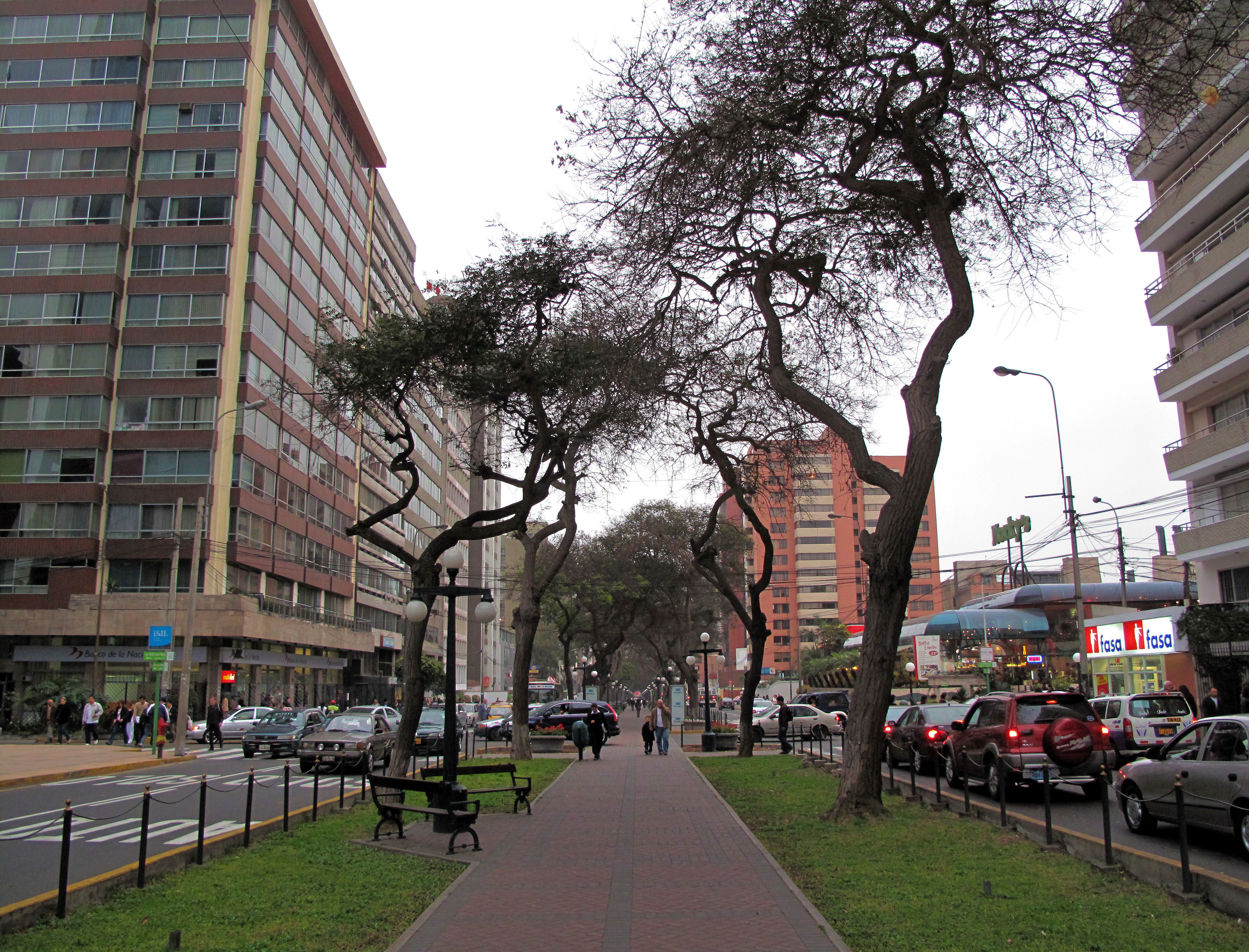 Avenida Jose Pardo